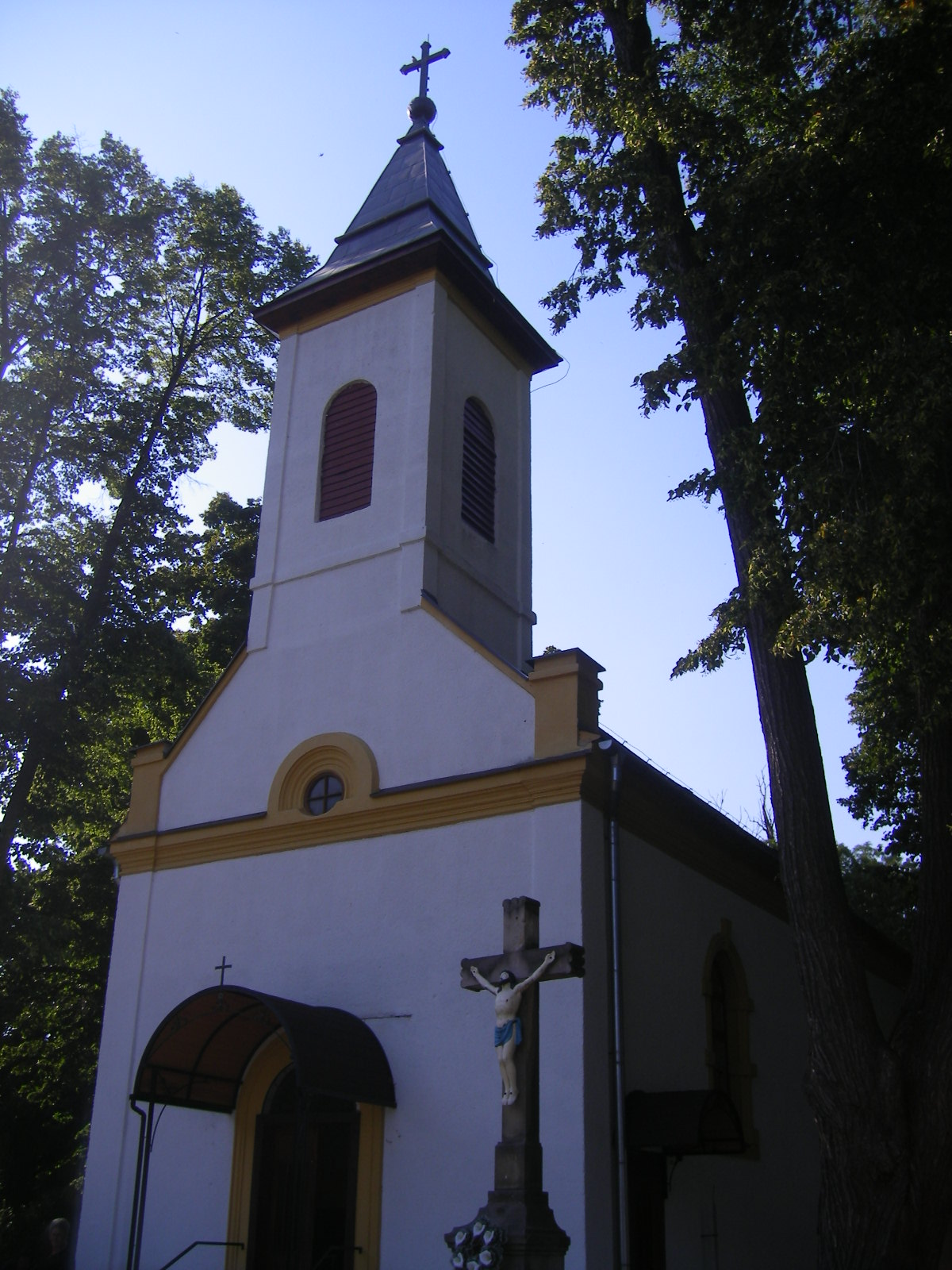 Ipolykeszi - katolikus templom